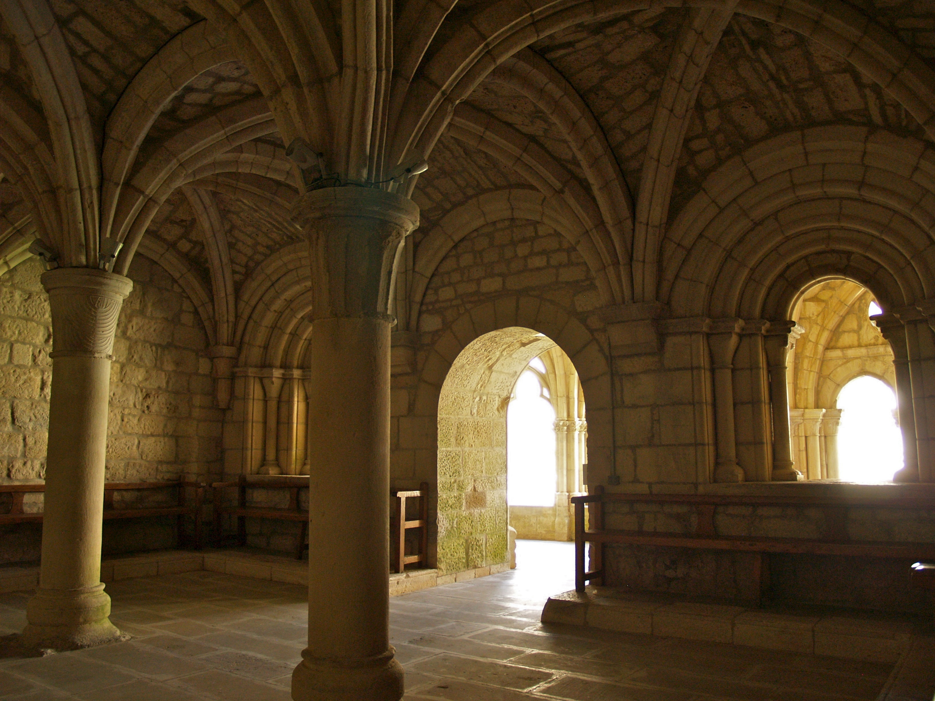 Monestir de Santa Maria de Iranzu - Sala Capitular